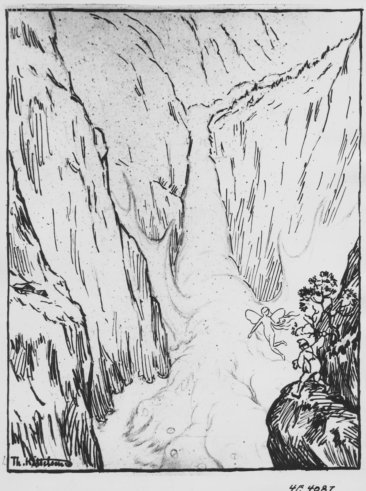 Skisse til tegning "Fossen"